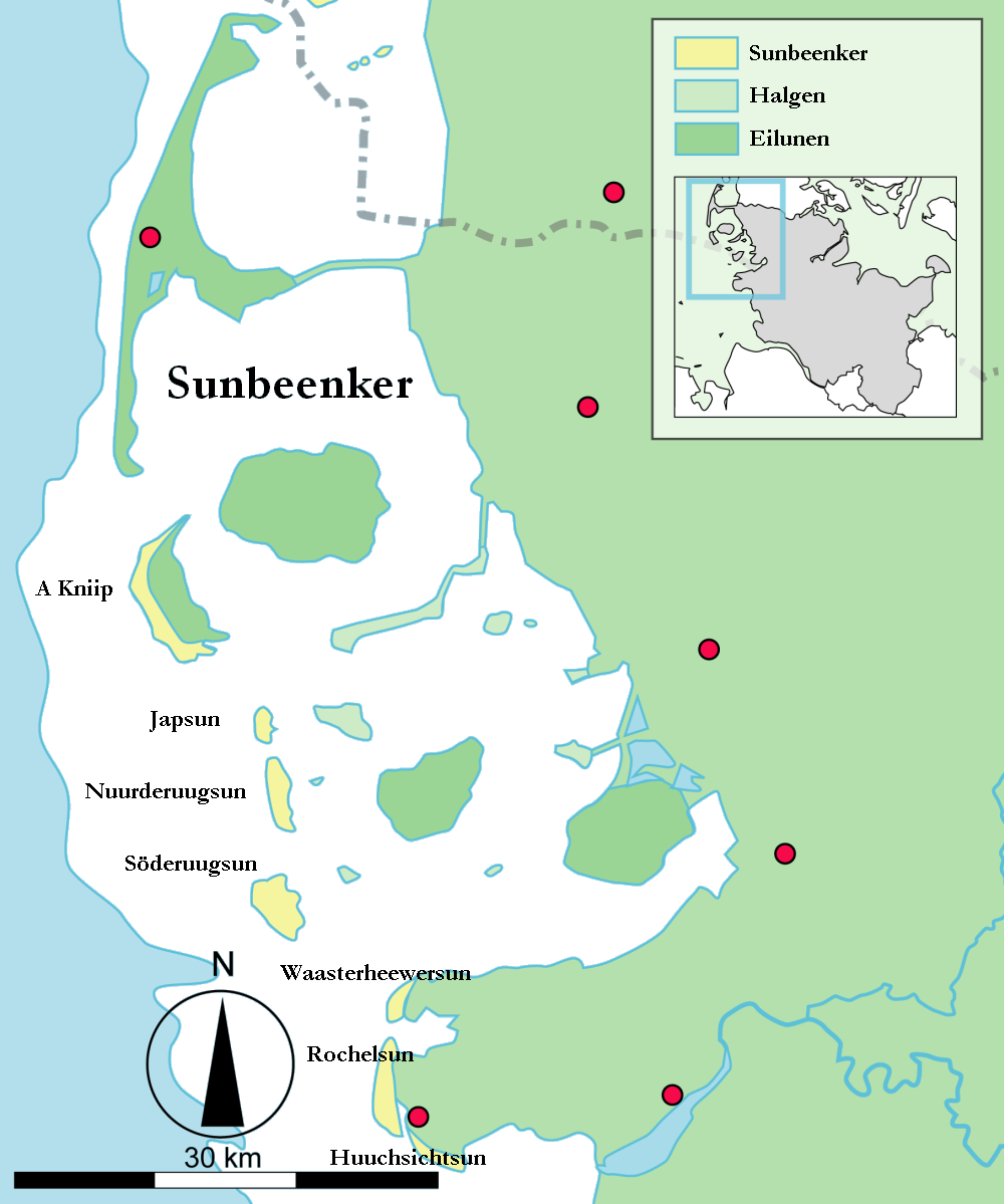 Sunbeenker uun Nuurdfresklun mä Öömrang nöömer.